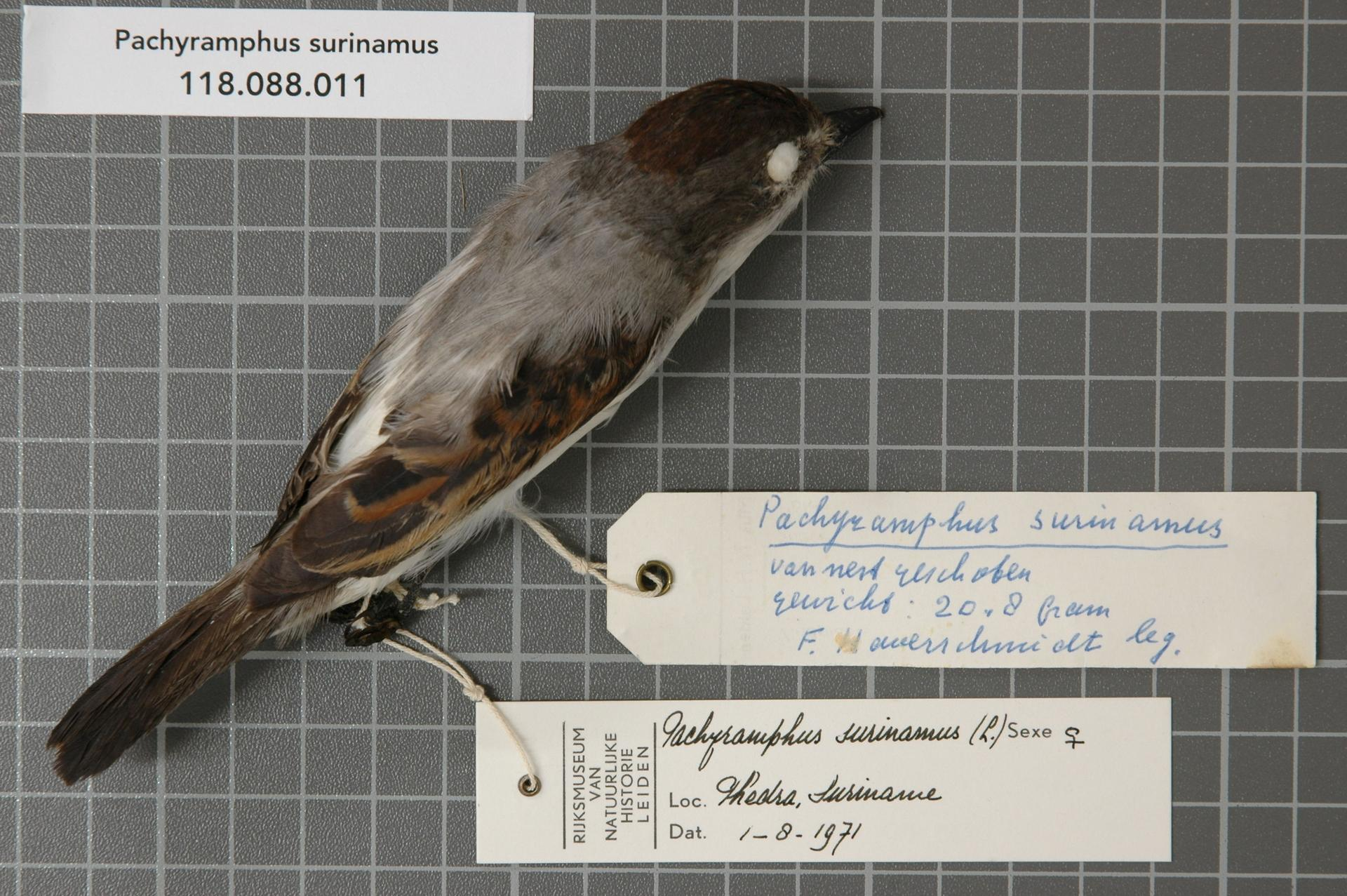 Pachyramphus surinamus (Linnaeus, 1766)